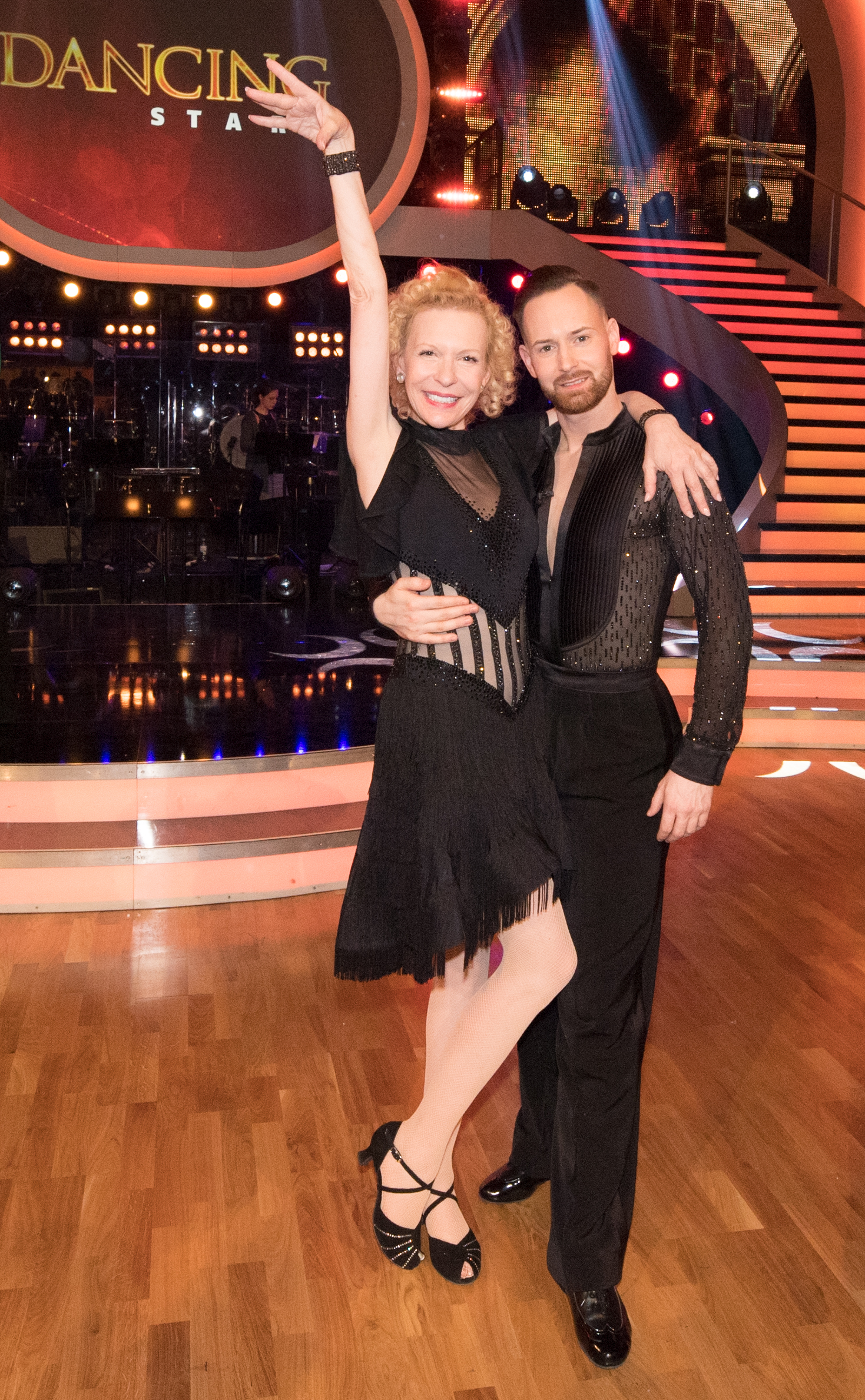 Wien, 15. März 2019: ORF Dancing Stars, 1. Folge - Bild zeigt Sunnyi Melles und Florian Vana.